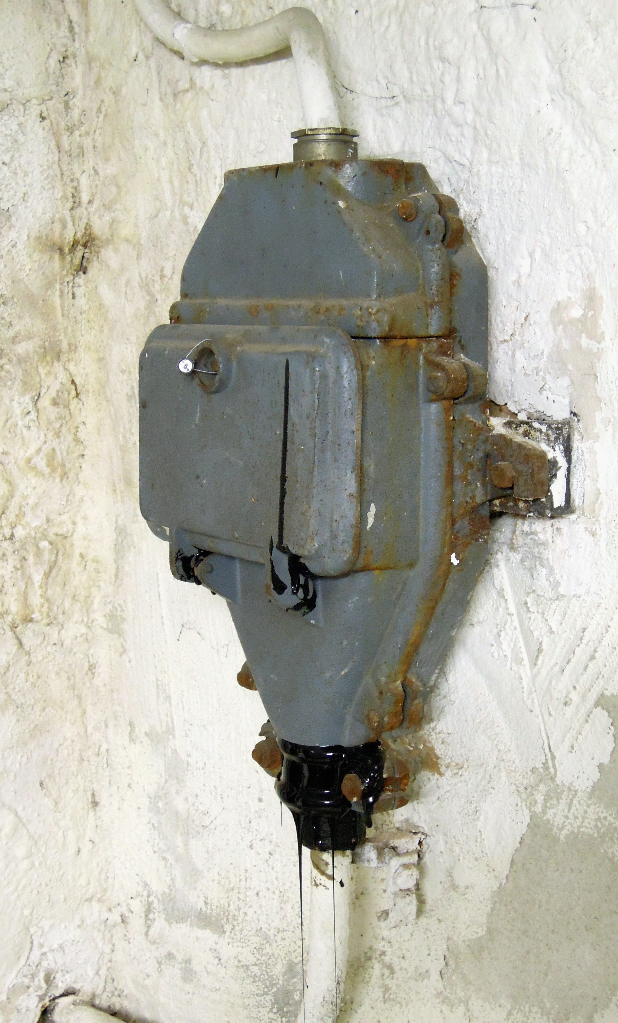 Hausanschlusskasten mit Diazet-Schraubsicherungen aus den 1950er Jahren; vergossene, papierisolierte, ölgetränkte Zuleitung von 1936